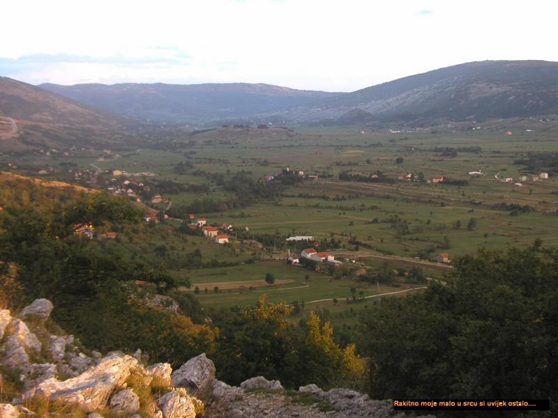 Pogled na Rakitno sa sjeverne strane.